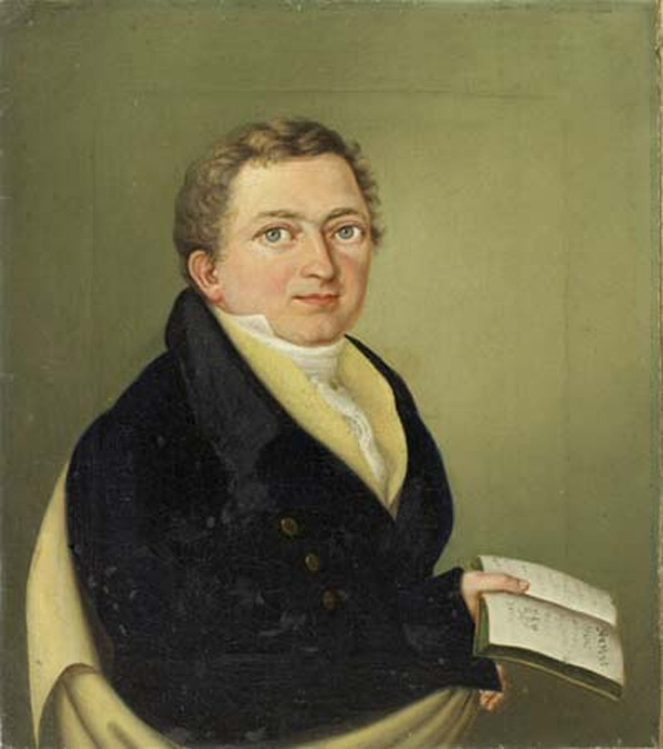 Karl Benjamin Preusker 1824